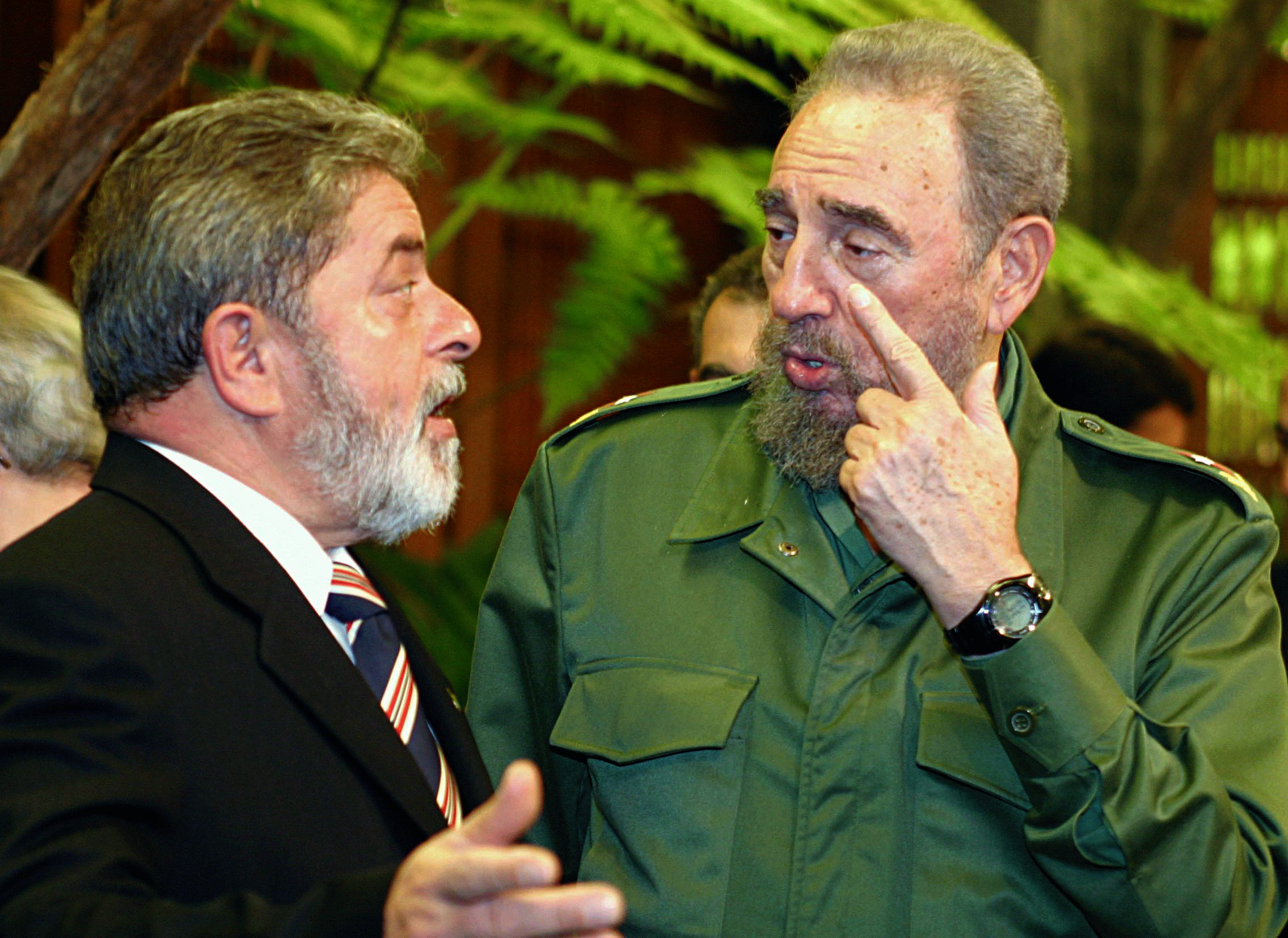 O líder cubano Fidel Castro.